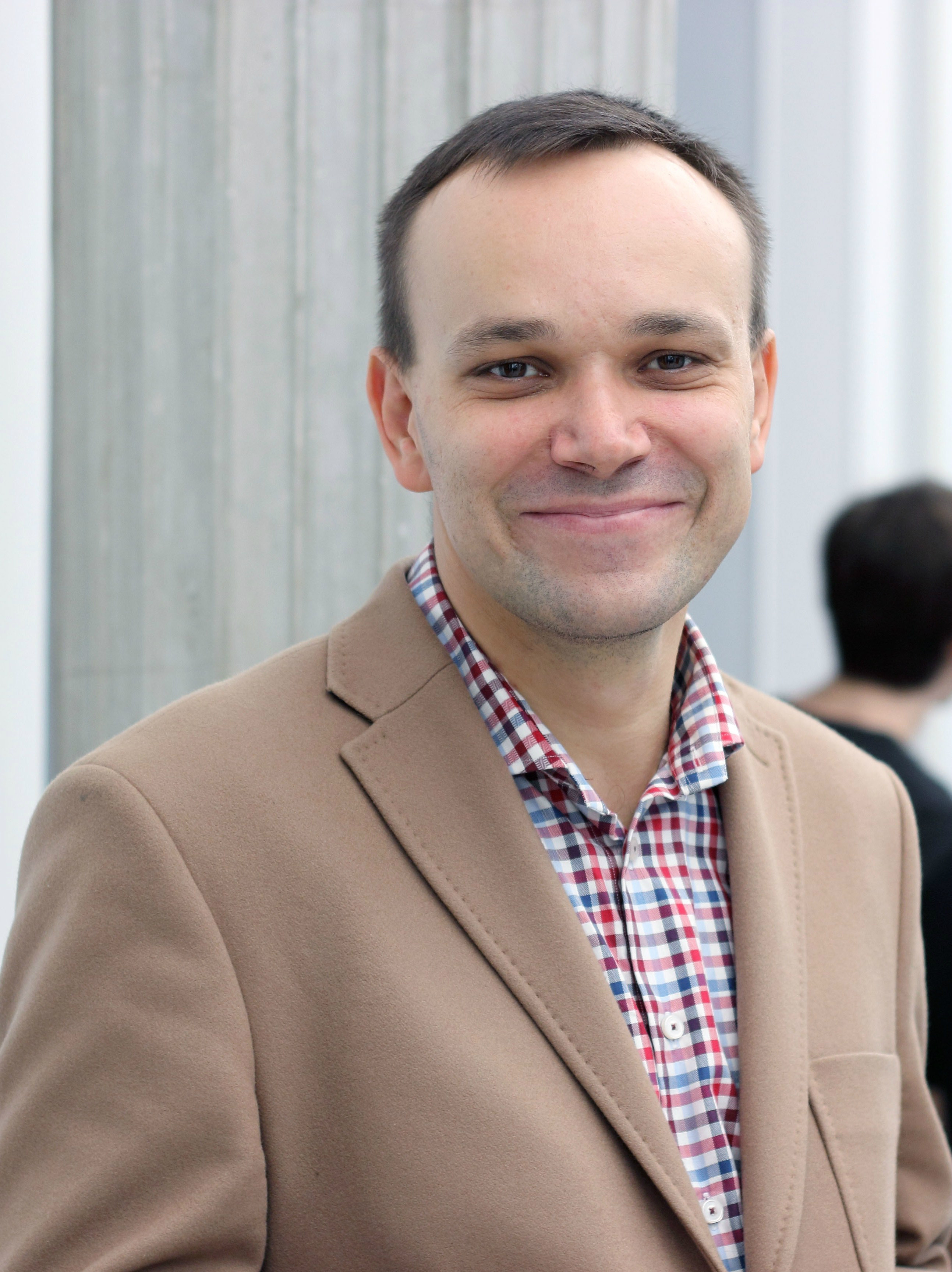 Tomasz Kalita, lewicowy polityk, były rzecznik prasowy Sojuszu Lewicy Demokratycznej.